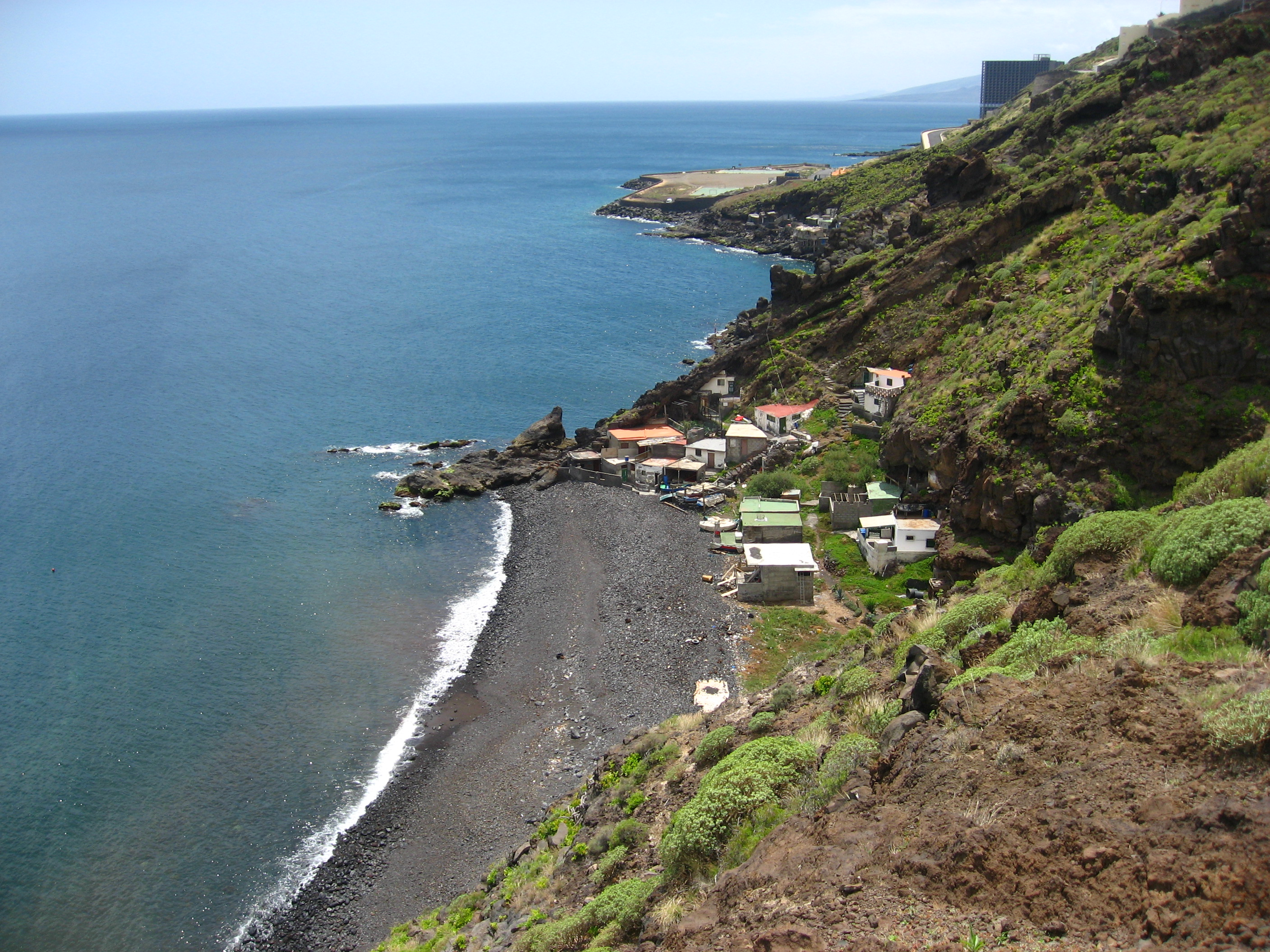 Vista de la paya del Muerto.